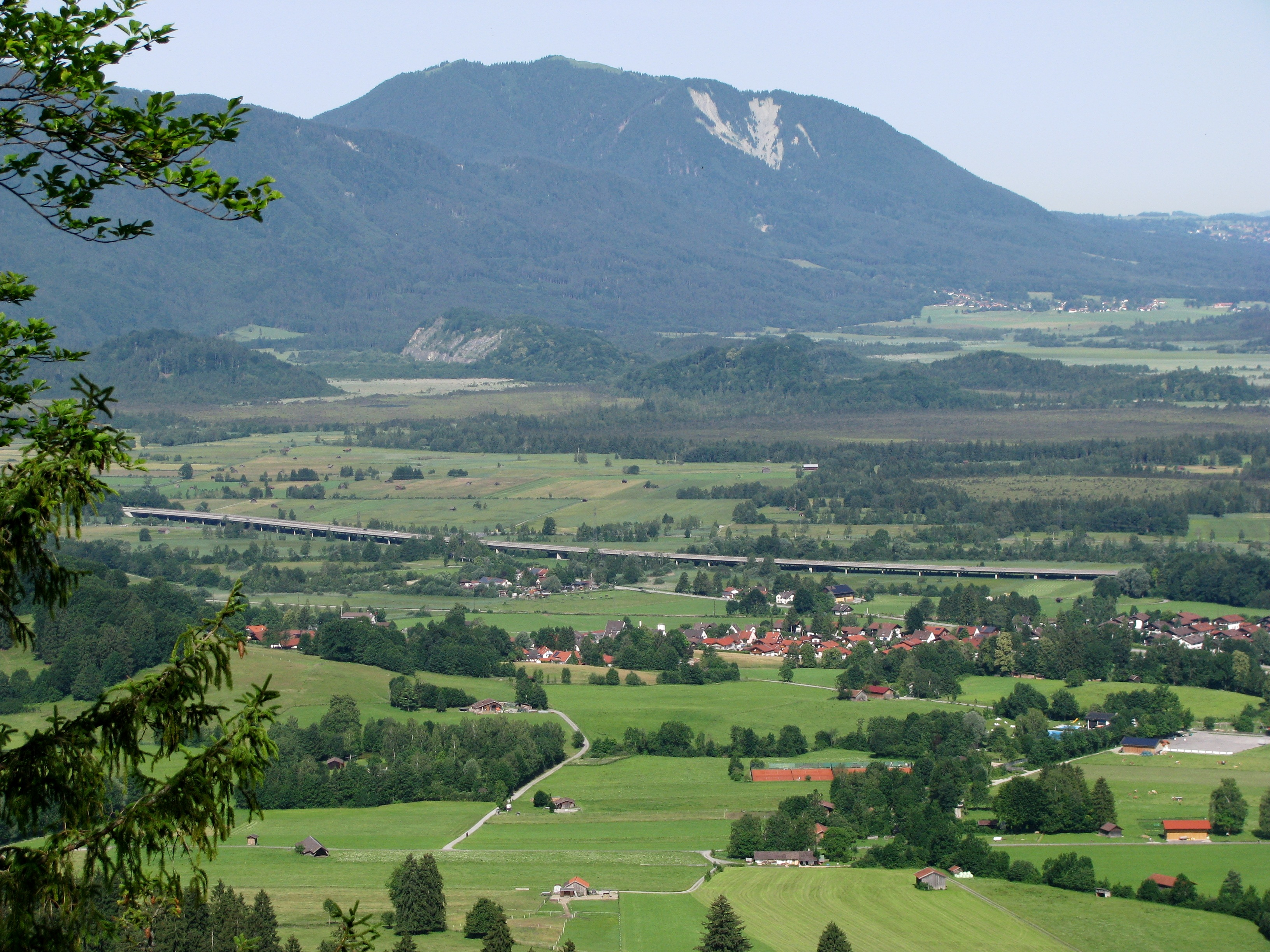 Ohlstadter Ortsteil Buchenried, dahinter die Loisachbrücke der A 95 und das Murnauer Moos; im Hintergrund das Hörnle mit Rißberg und Rißgraben